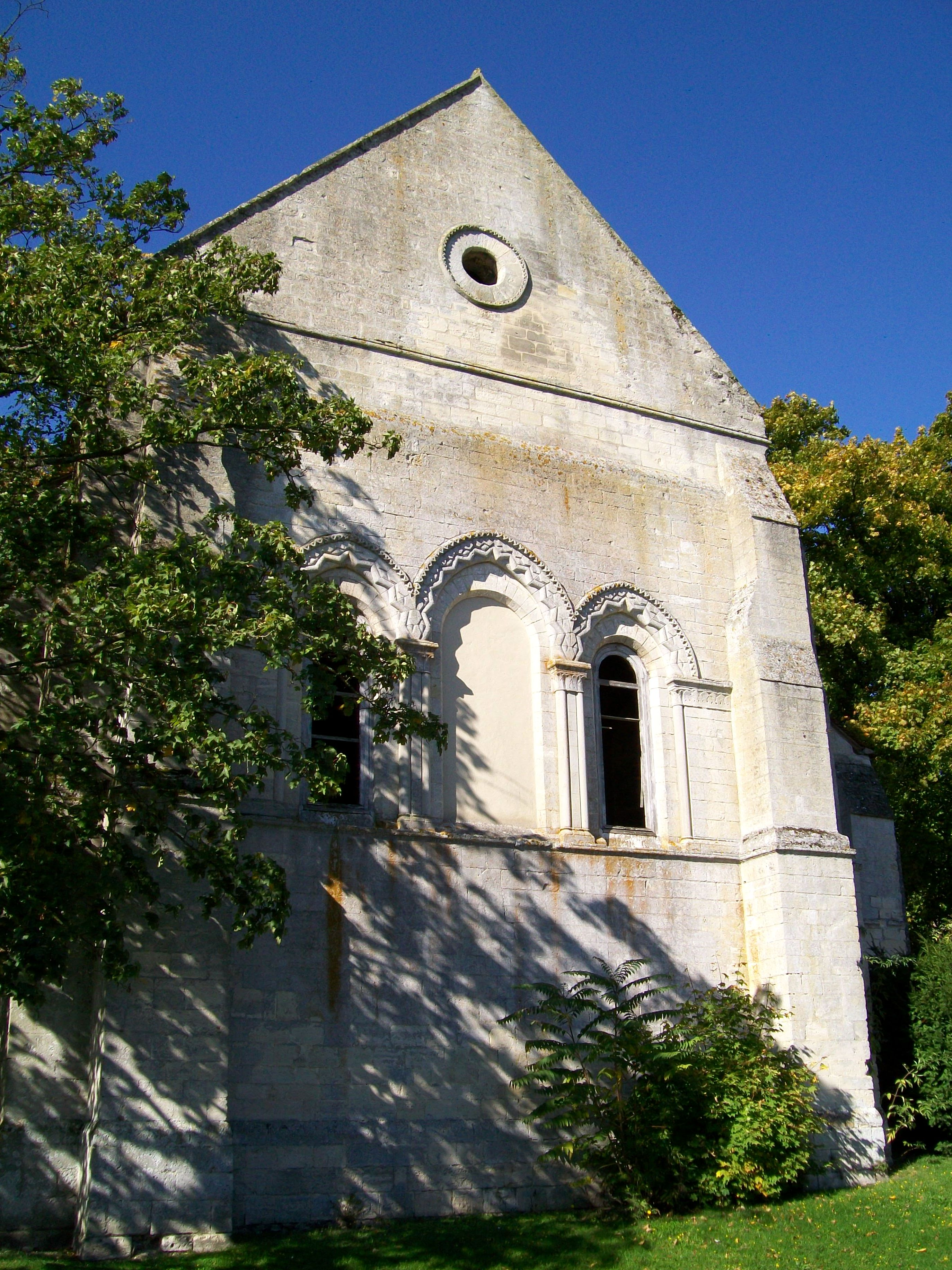 Le chevet roman de la chapelle ruinée du prieuré Saint-Christophe, fondé en 1061.